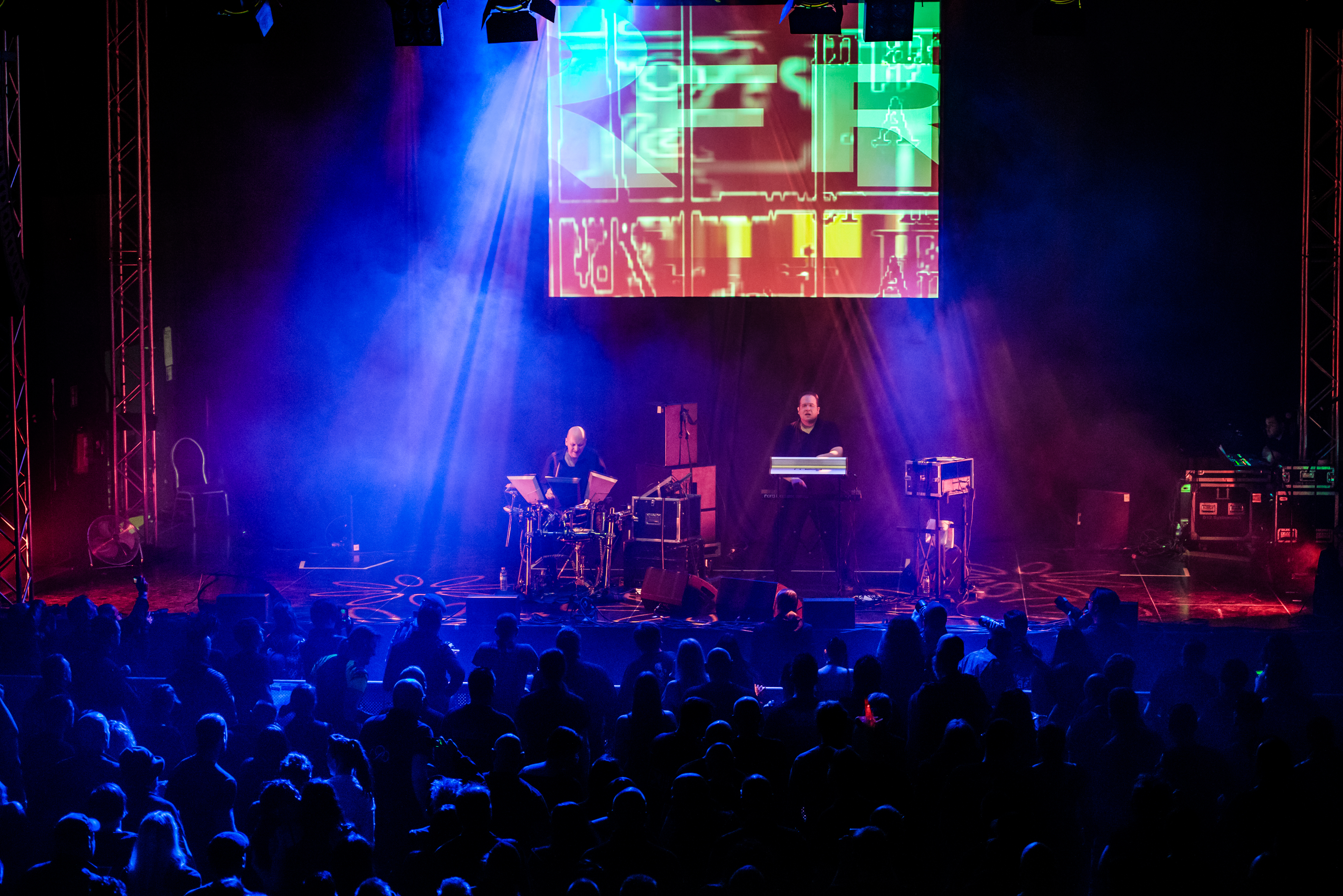 E-Tropolis Festival 2016; Oberhausen Turbinenhalle - Winterkälter